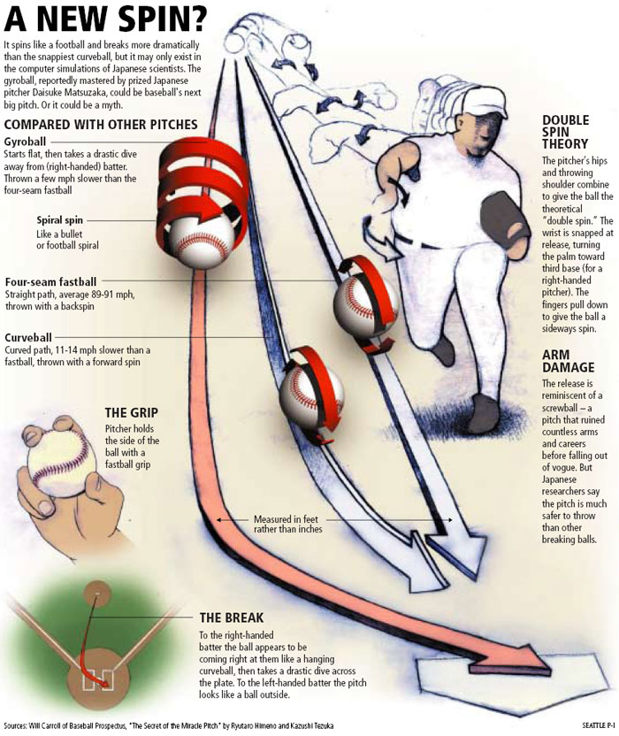 salida de una gyroball